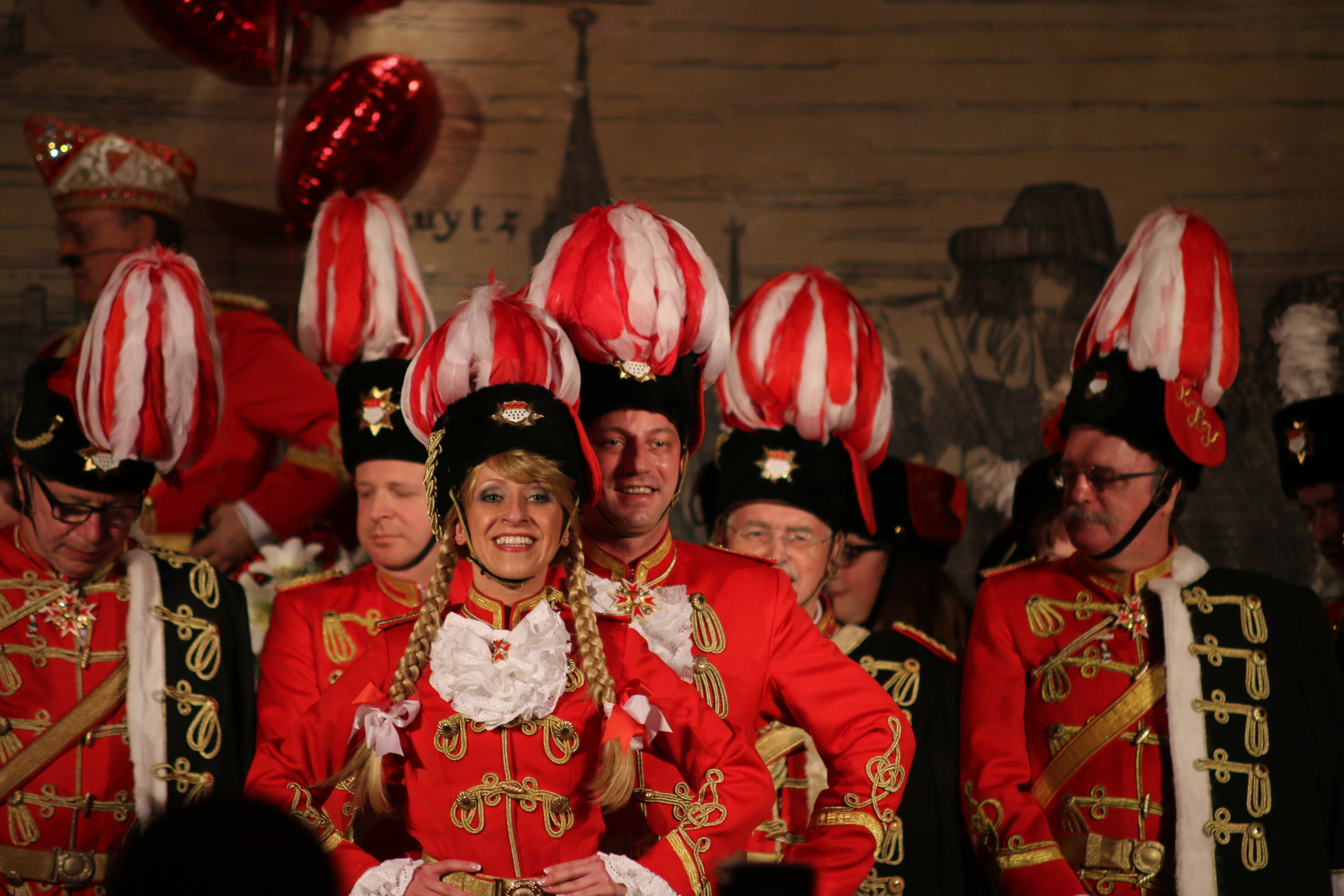 Kölner Husaren-Korps Prunksitzung 2014: Tanzpaar des Korps